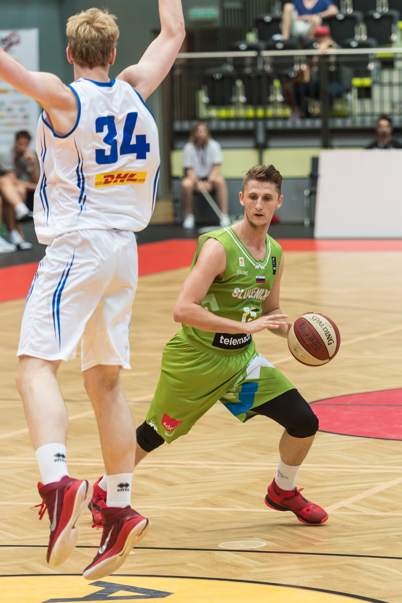 ÖBV Vier-Nationen-Turnier vom 12.-14. August 2016 in Schwechat - Island vs Slowenien. Bild zeigt Trygvi Snaer Hlinason (ISL) und Gezim Morina (SLO).